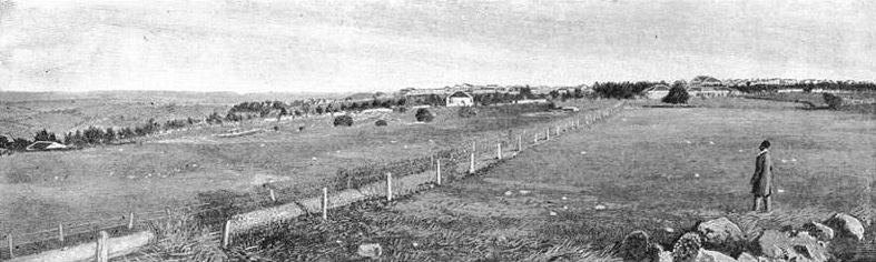 Zikron Ya'aqob